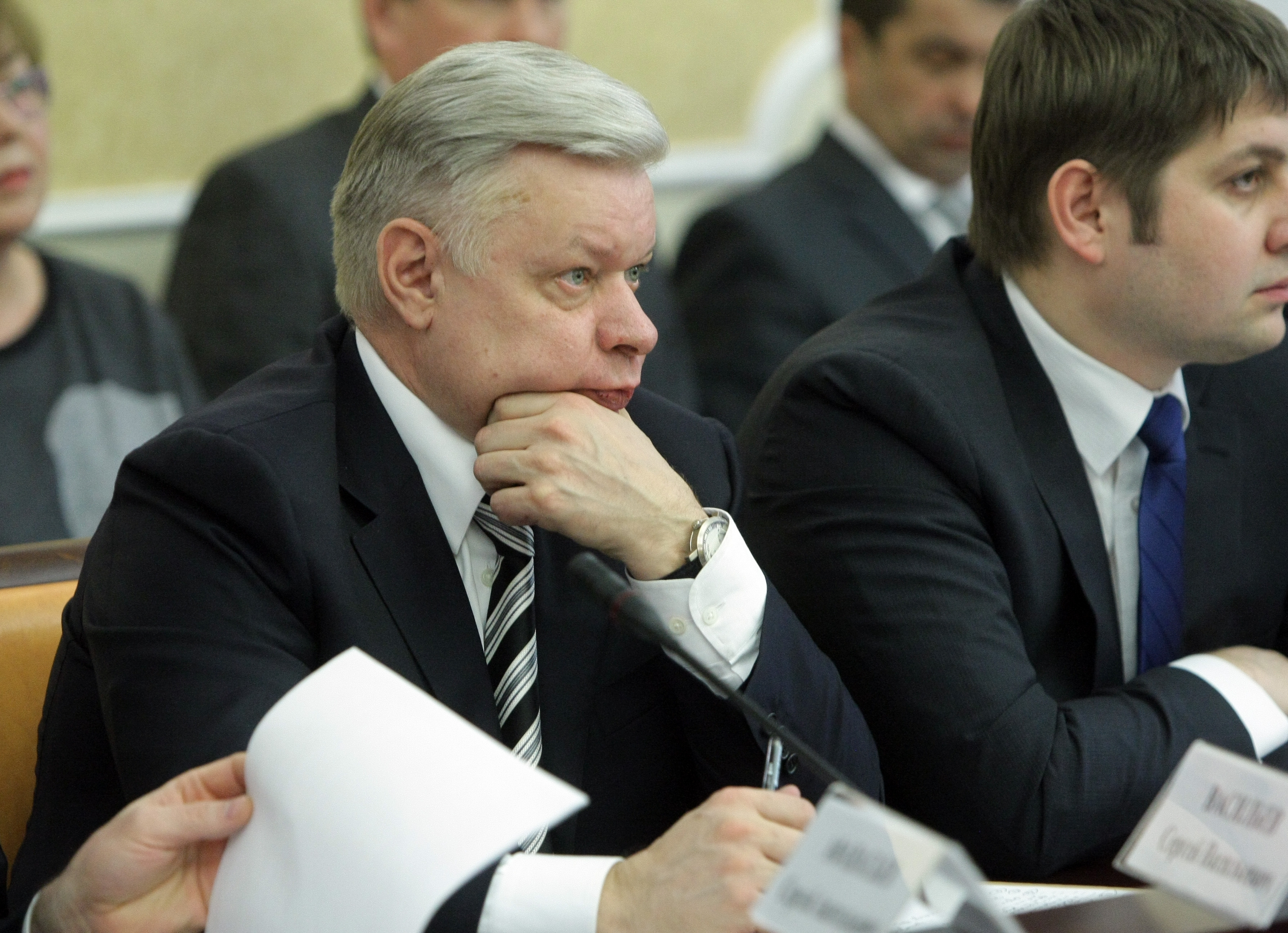 Директор Федеральной миграционной службы К. О. Ромодановский на заседании президиума совета при Президенте Российской Федерации по развитию местного самоуправления по вопросу «О мерах по повышению качества предоставления государственных и муниципальных услуг населению»